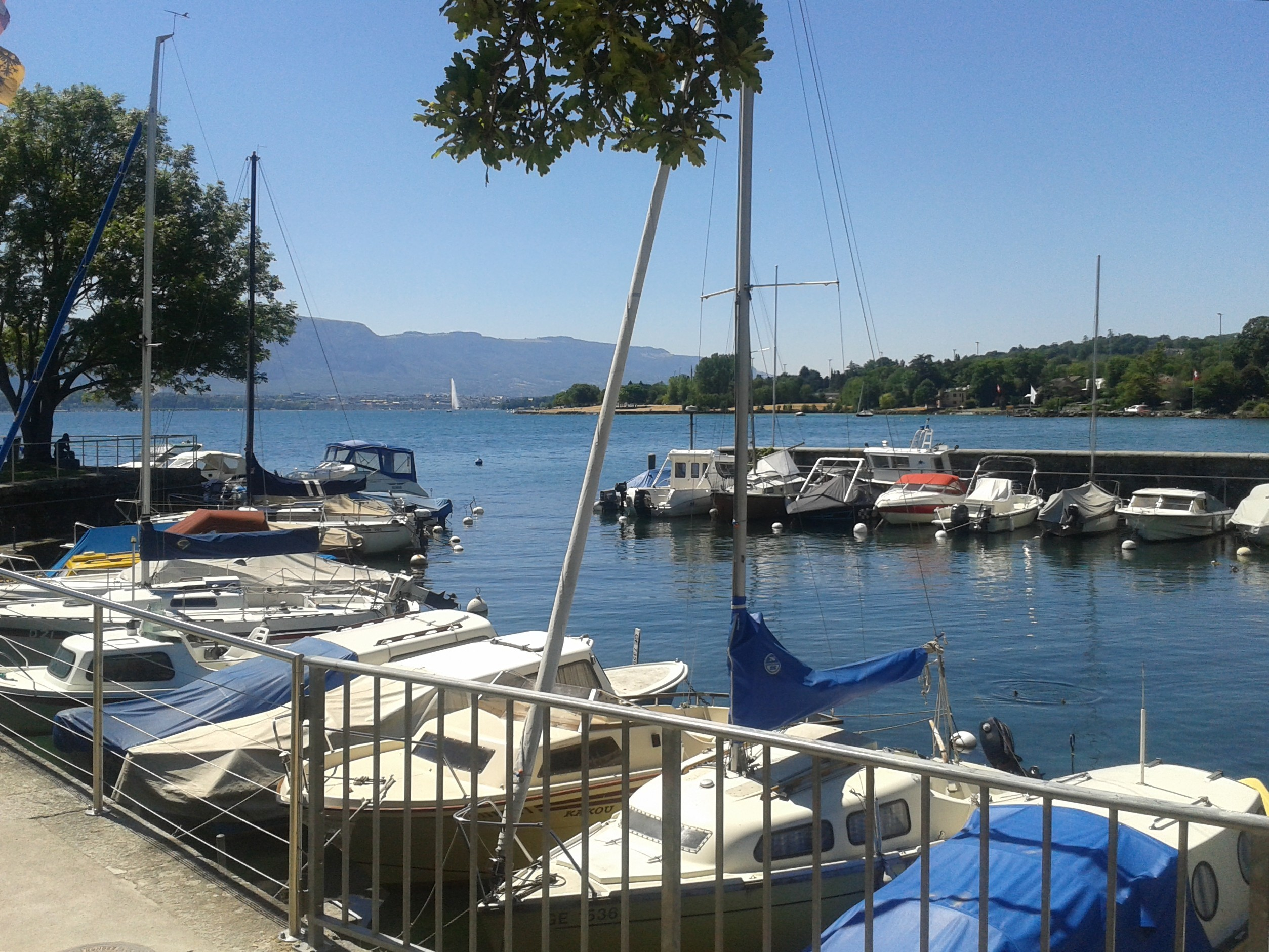 Port Gitana de la commune suisse de Bellevue, sur le Léman